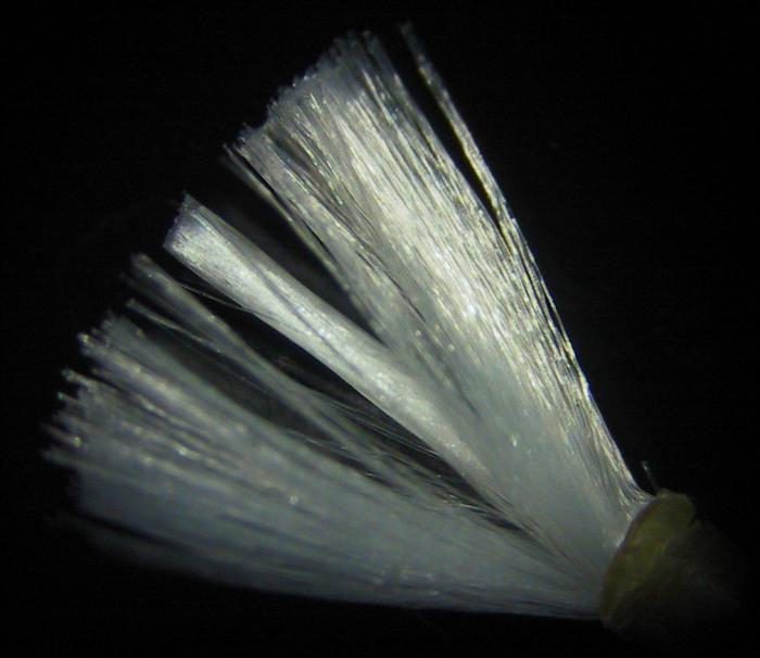 Präparierte Tennissaite Isospeed Energetic (Mikroskopieaufnahme)